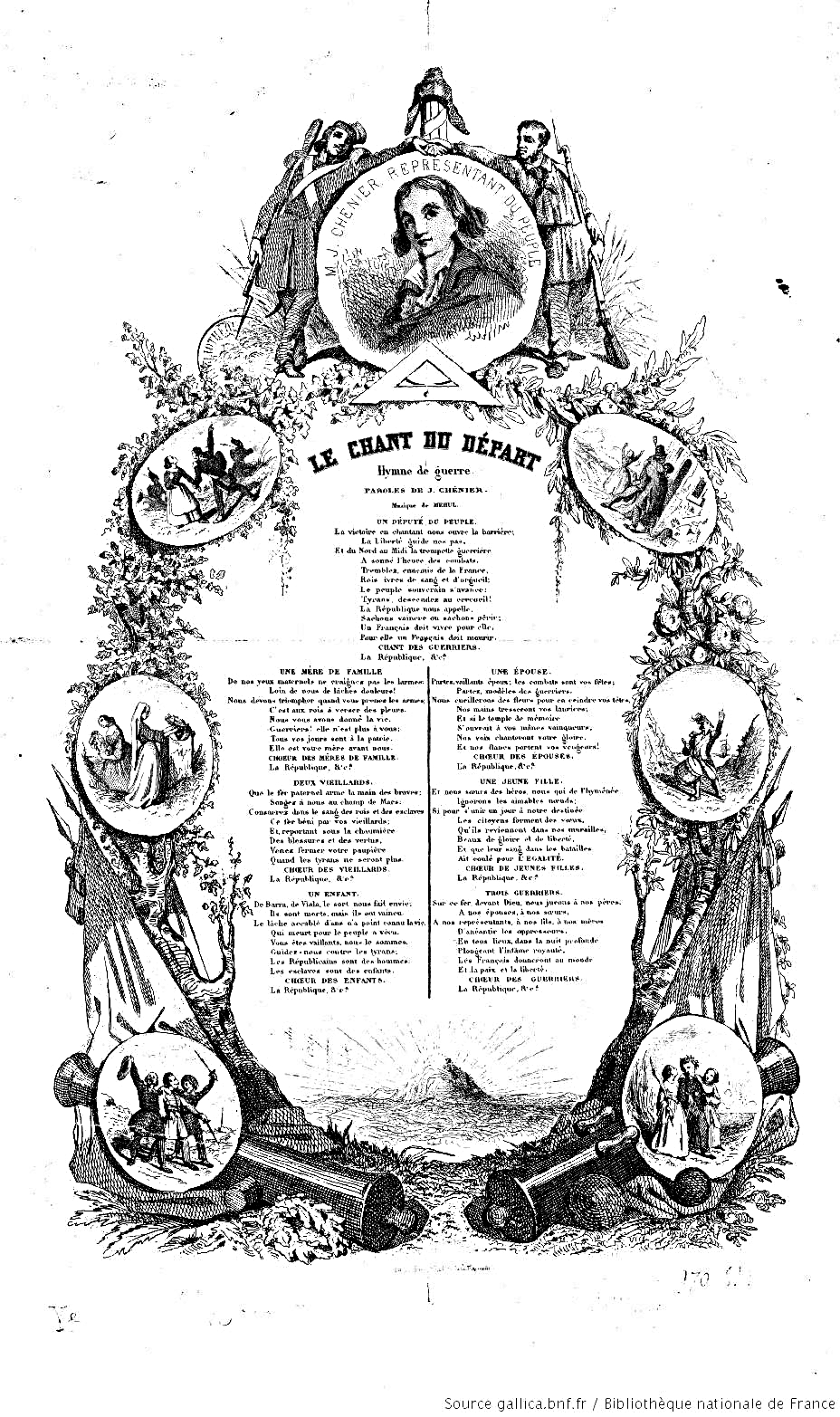 Marie-Joseph de Chénier, (1764-1811).- Le Chant du départ, hymne de guerre, imprimerie de Beillet, Paris t, (S. d.).